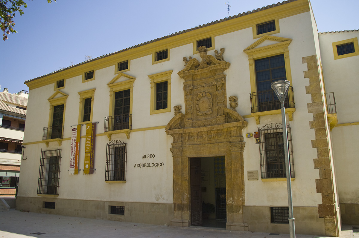 Casa de los Salazar-Rosso, Museo Arqueológico de Lorca (Región de Murcia). Archaeological Museum of Lorca Native nameMuseo Arqueológico Municipal de LorcaLocationLorca, (Spain)Coordinates37° 40′ 42.6″ N, 1° 41′ 47.76″ W Established1992Web page control : Q9046770 VIAF: 150234161 ISNI: 0000 0001 2183 9866 LCCN: n2004042578 GND: 16064712-5 SUDOC: 147486432 WorldCat institution QS:P195,Q9046770